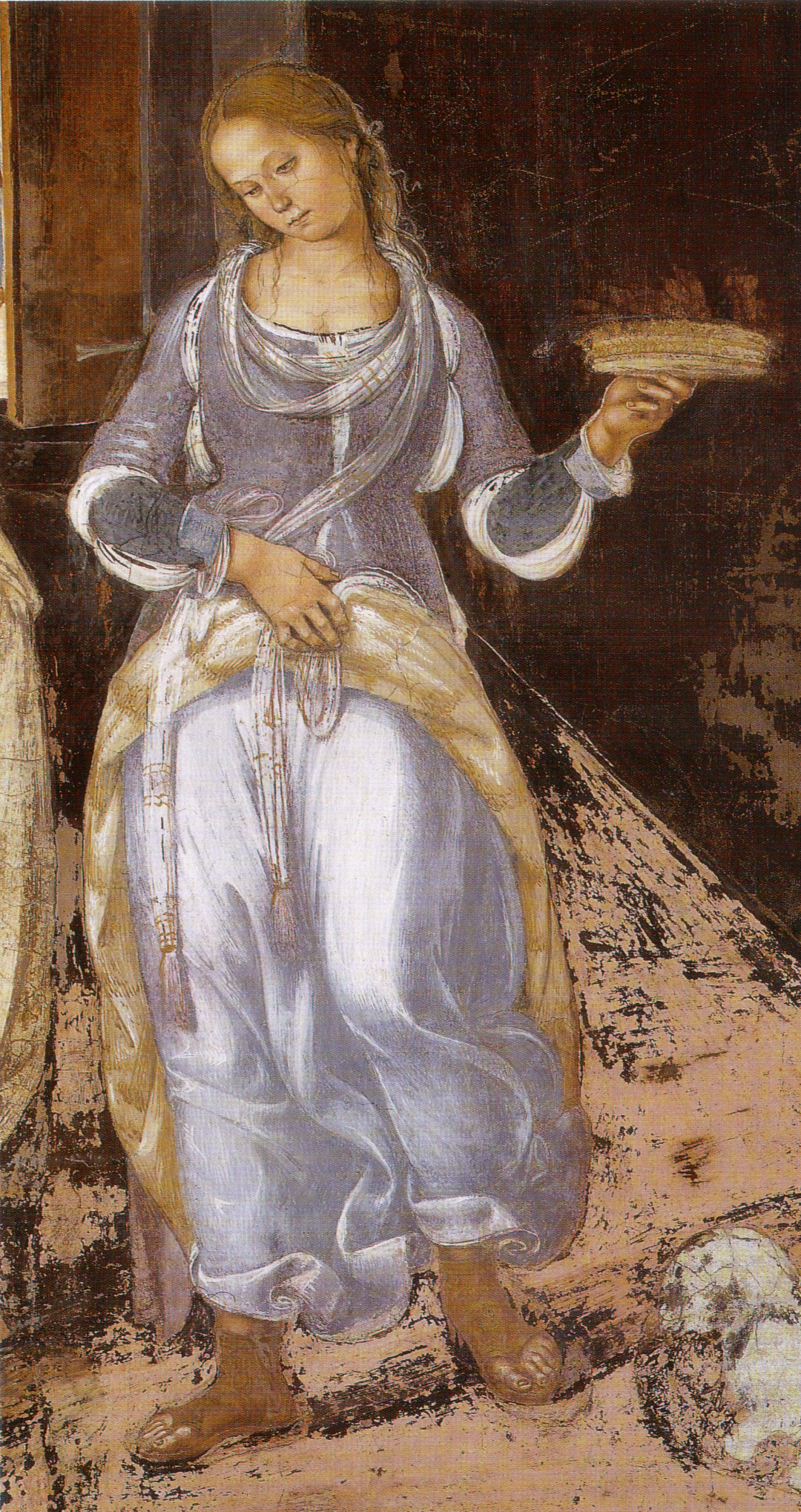 Luca signorelli, storie di san benedetto a monteoliveto, san benedetto rimprovera due monaci che hanno violato la Regola, dett